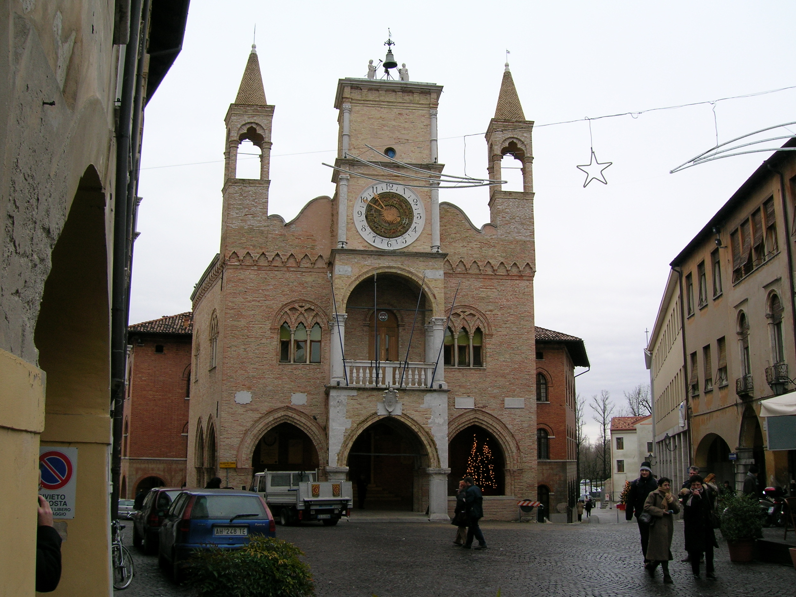 Palazzo Comunale di Pordenone (1291 - 1365). Foto mia.